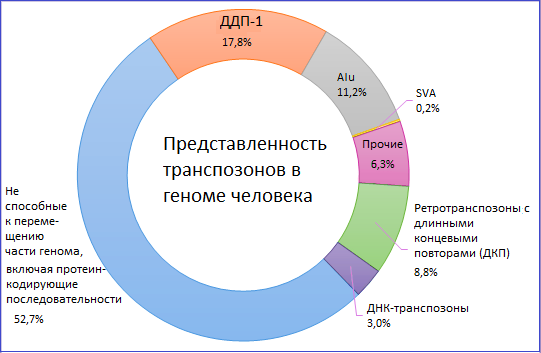 Представленность транспозонов в геноме человека